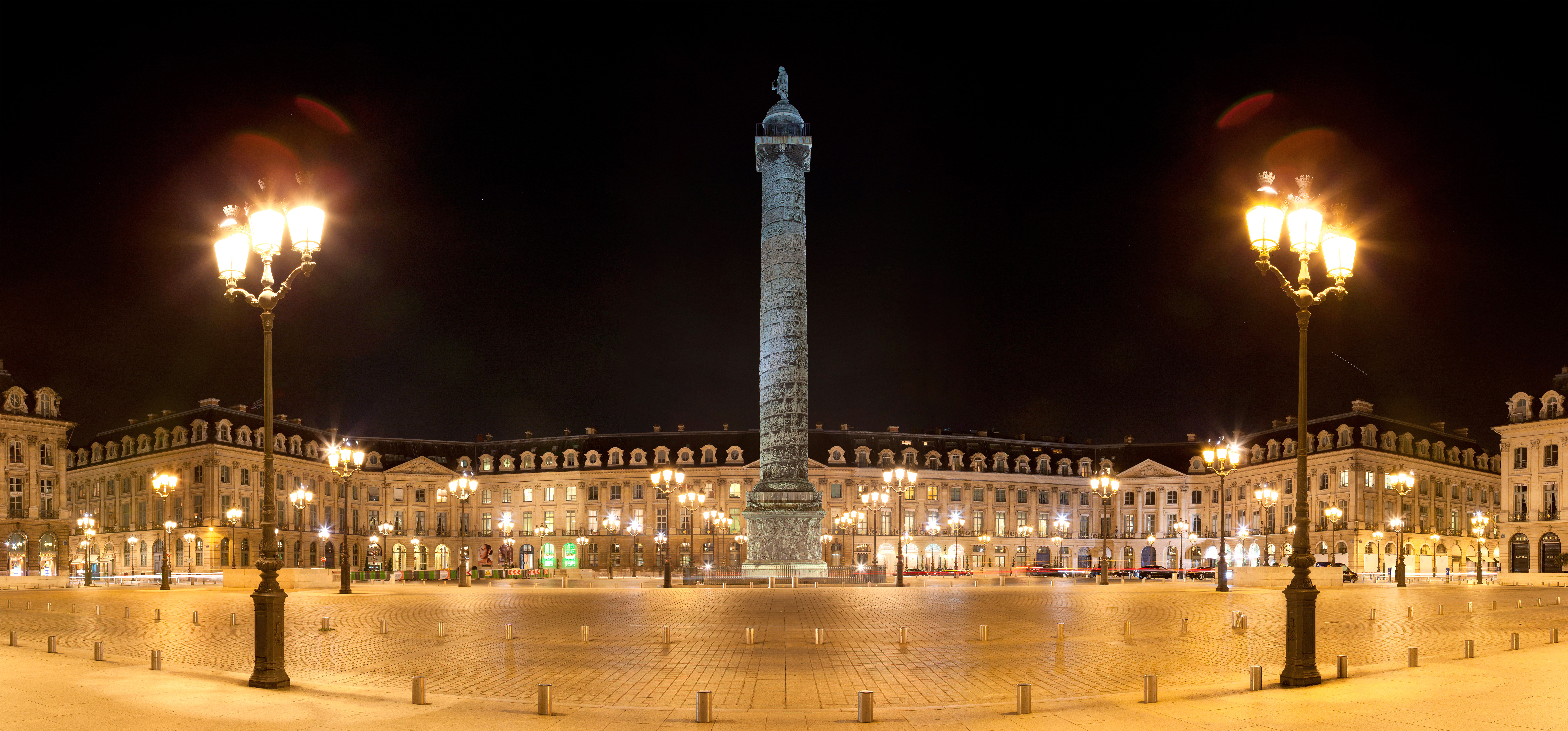 Place Vendôme, Paris.